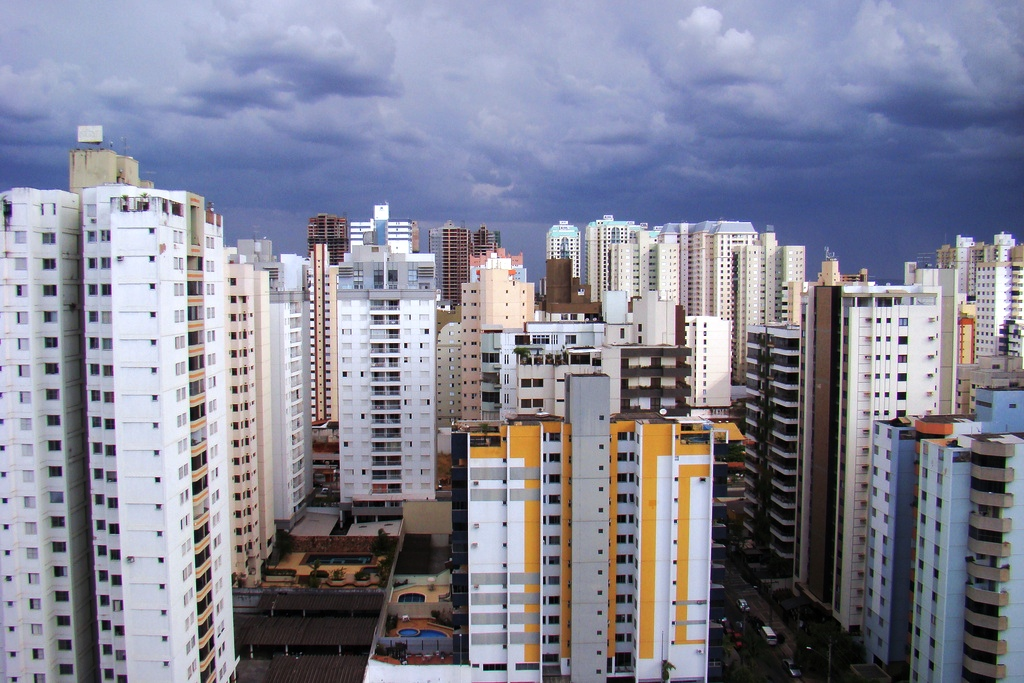 Prédios no bairro Bueno, na região Sul de Goiânia, Goiás, em 2009